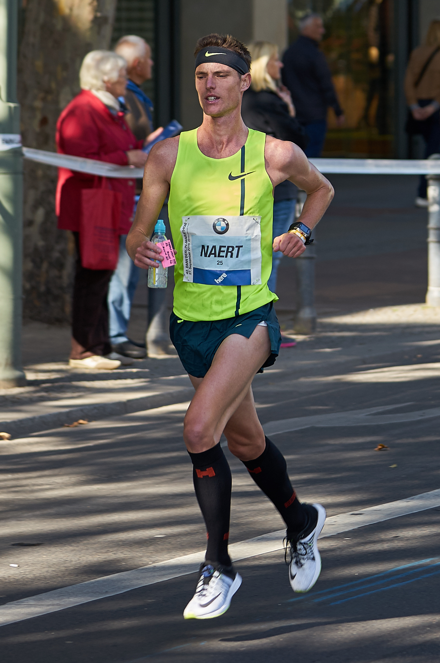 Berlin Marathon 2015 Naert, Koen (BEL)